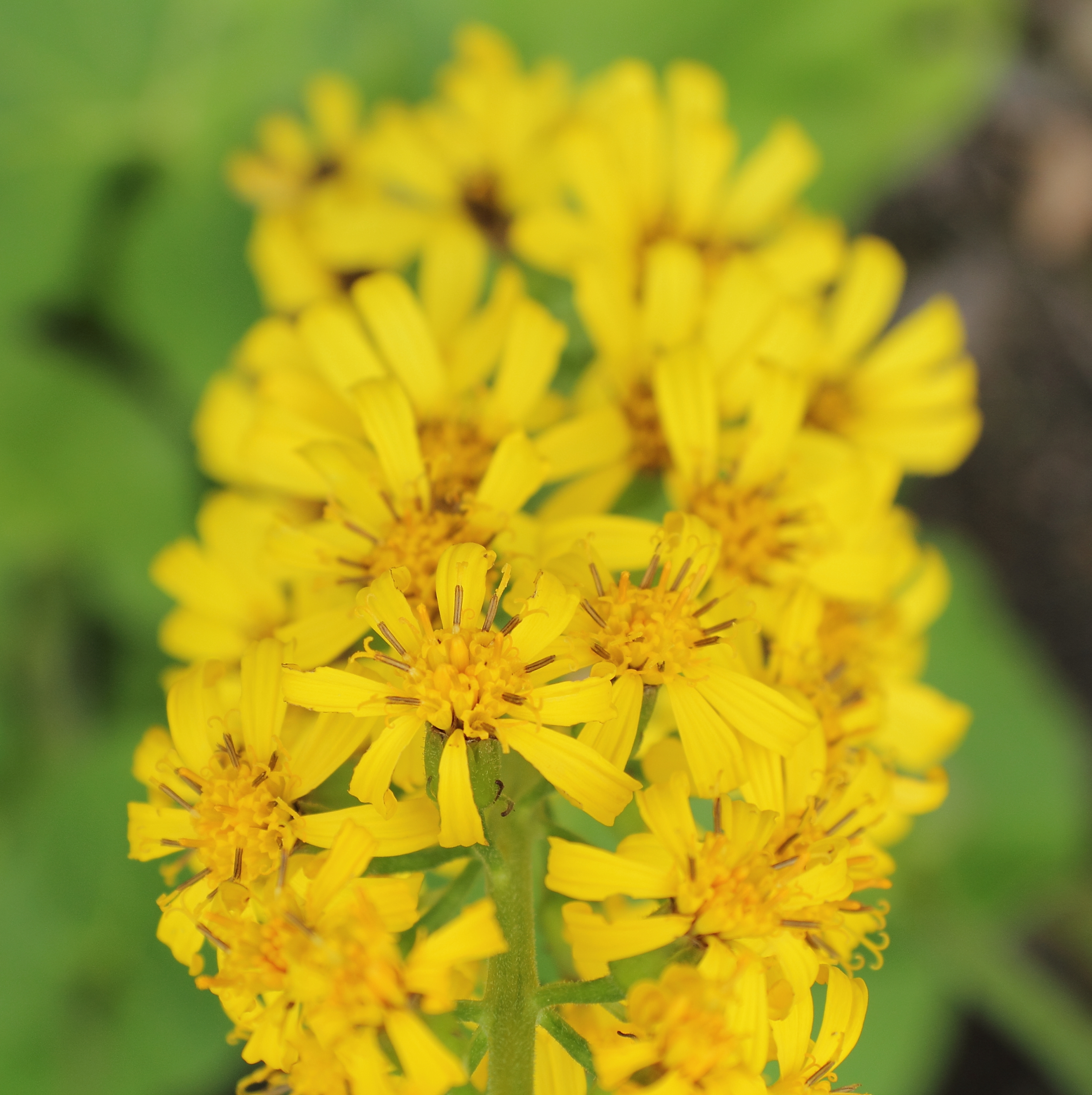 Ligularia sibirica at Uppsala Botanic Gardens